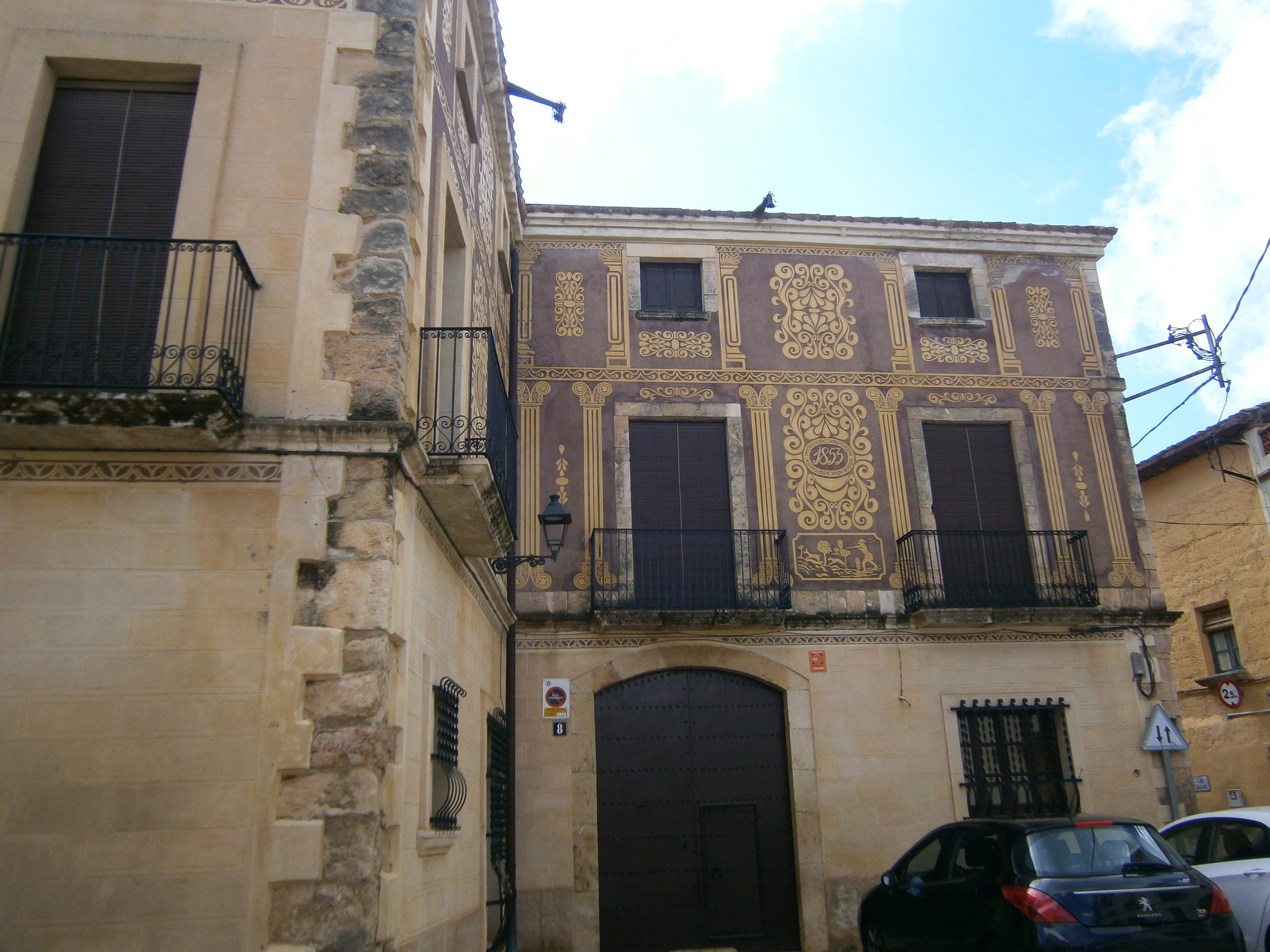 Casa amb esgrafiats i antic castell a la plaça Major de Bonastre